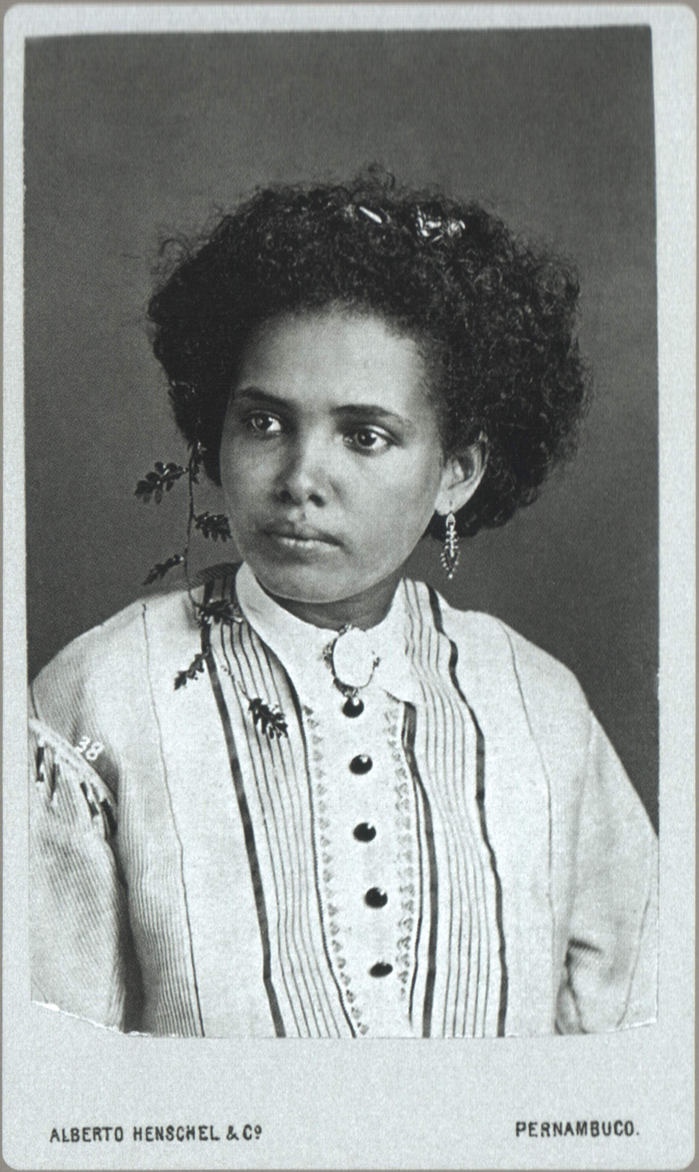 Moça mulata de Salvador, Província da Bahia, vestindo roupas de estilo europeu. Albúmem, carte-de-visite, 9 x 5,6 cm.